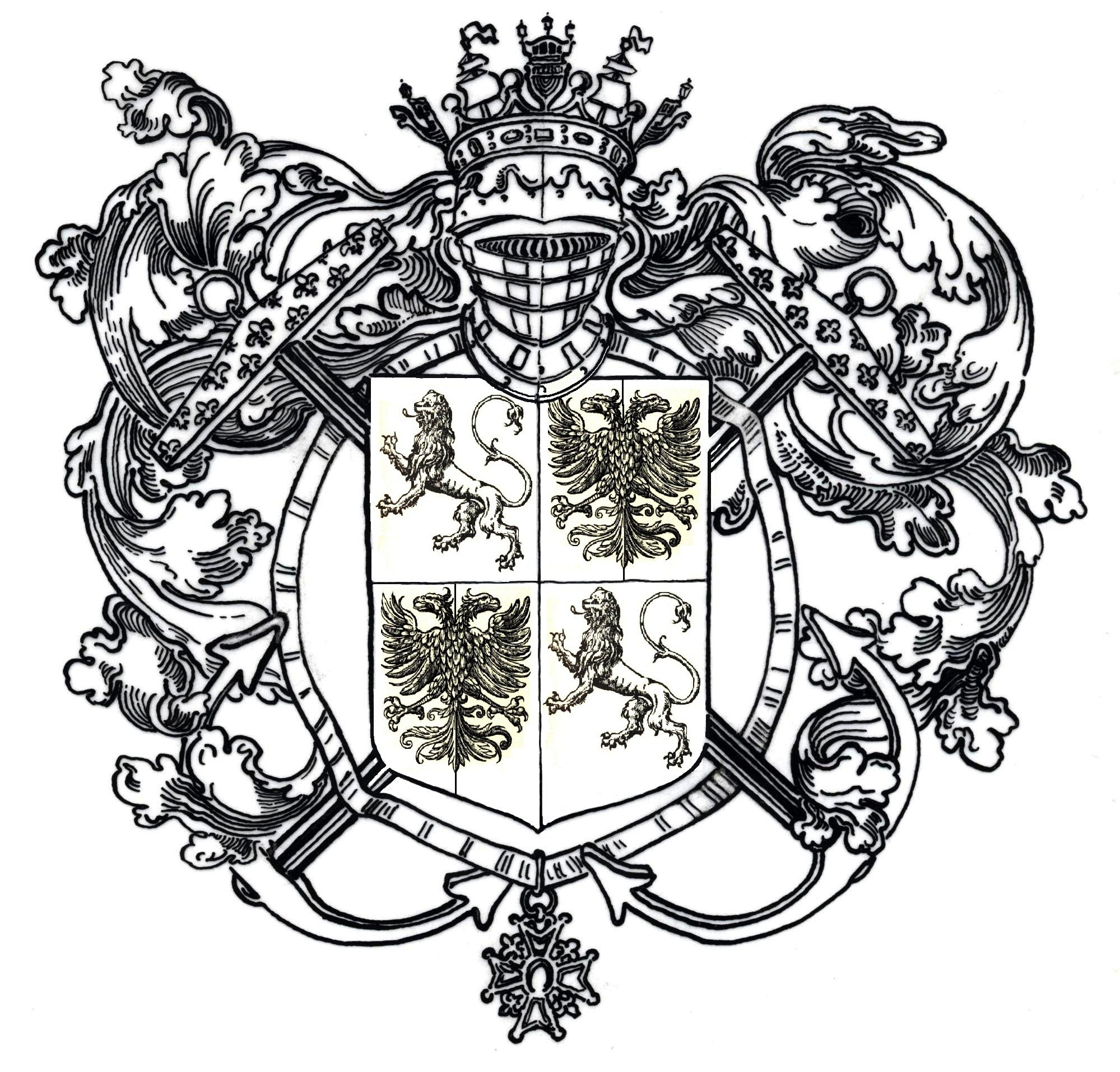 Armoiries de l'amiral Guillaume de Liberge de Granchain (1744-1805)